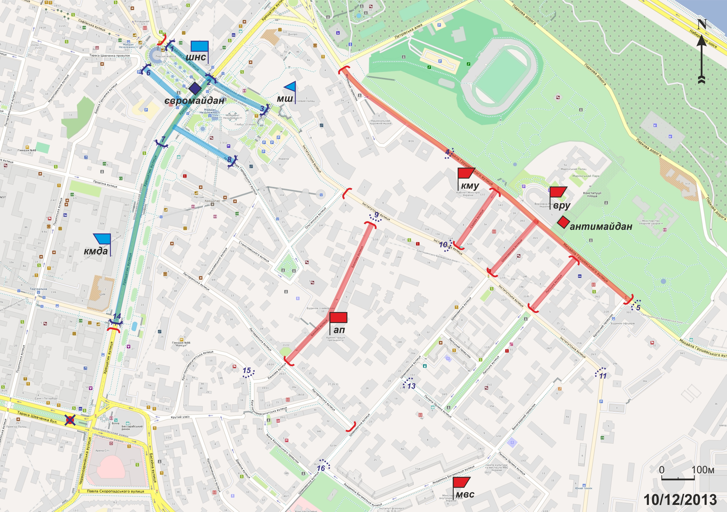 Сині кола - барикади повстанців, жовті кола - барикади розібрані беркутом і комунальниками; червоні квадрати - підрозділи МВС і Беркута, заблоковані ними вулиці виділені червоним. Вулиці заблоковані повстанцями виділені синім. Прапорці - штаби сил. Закреслена червона точка - руїни пам'ятника Леніну на Бесарабці. Скорочення: ШНС - штаб національного спротиву, КМР - київська міська рада, АП - адміністрація президента, КМУ - кабінет міністрів України, ВРУ - верховна рада України, МВС - міністерство внутрішніх справ, ОП - "Октябрський" палац (Палац Свободи)